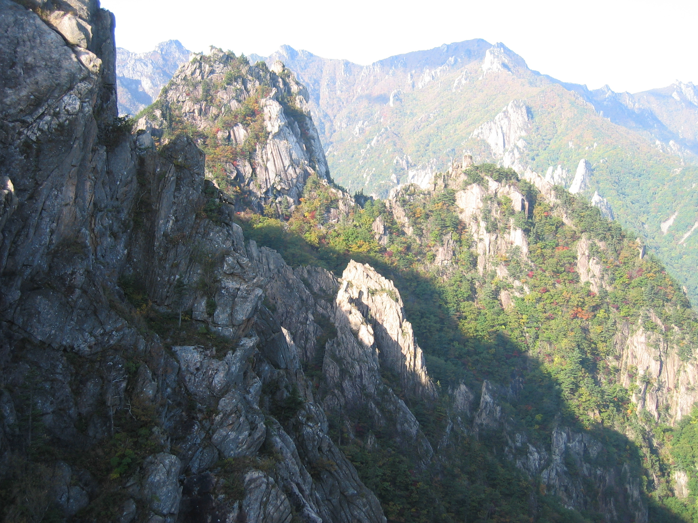 Seoraksan, Gangwon-do, South Korea